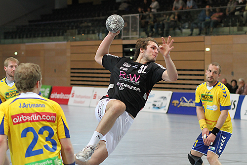 Cornelius Maas, hier im Obernburger Trikot, auf Torejagd.